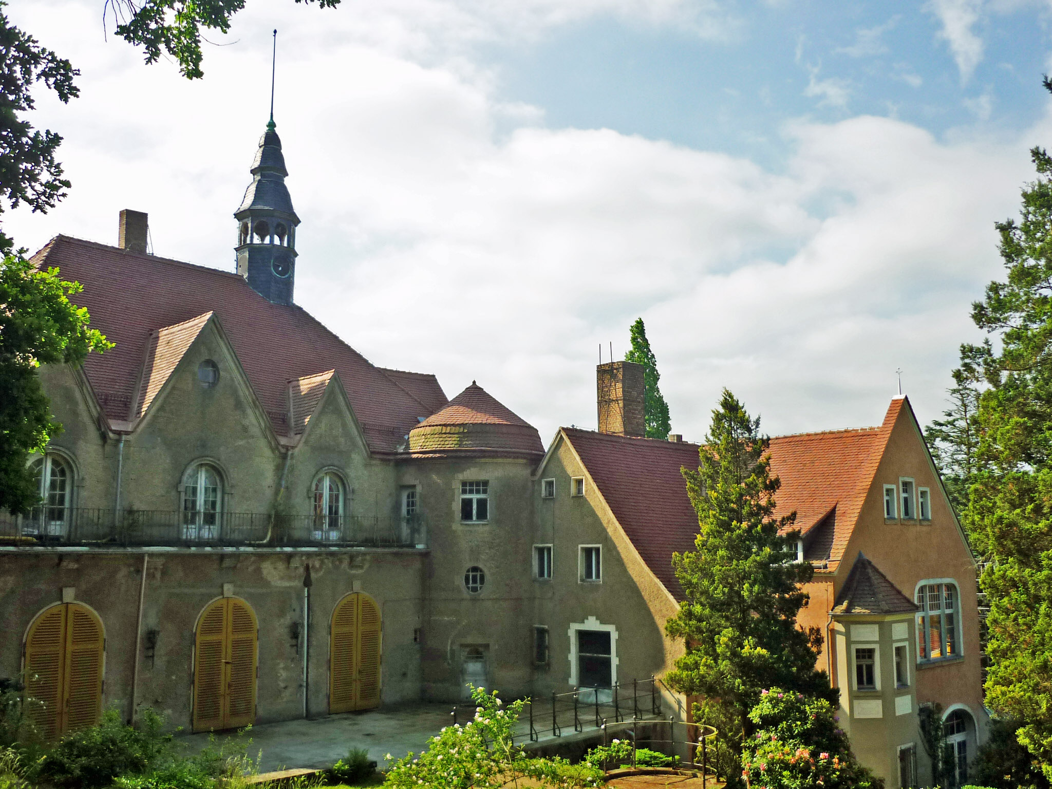 Schloss Thürmsdorf in der Sächsischen Schweiz, von 1908-1935 im Besitz der Fam. von Biedermann